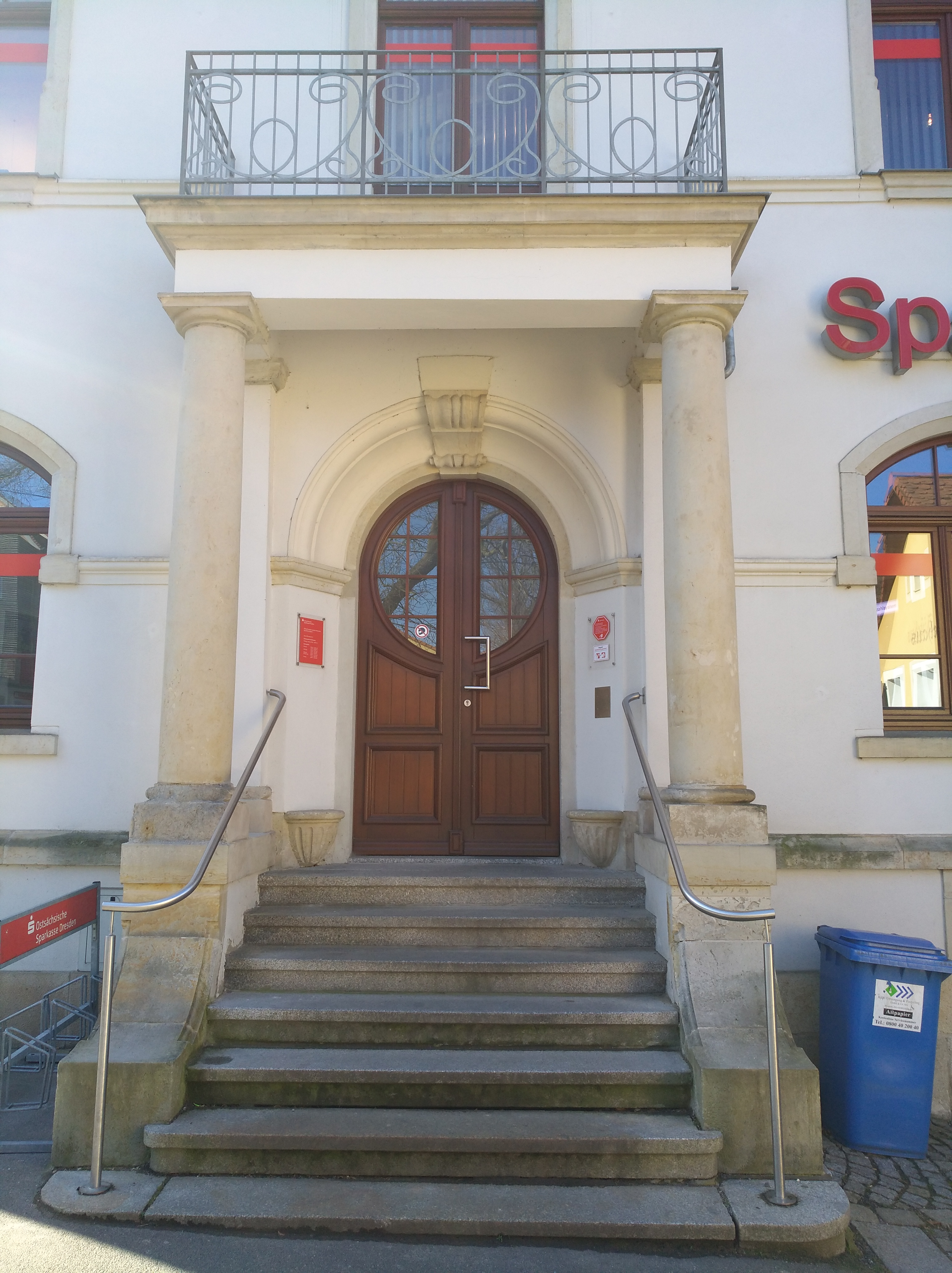 Ehemaliges Rathaus Leubnitz-Neuostra (Dresden), Klosterteichplatz 4 (2018)